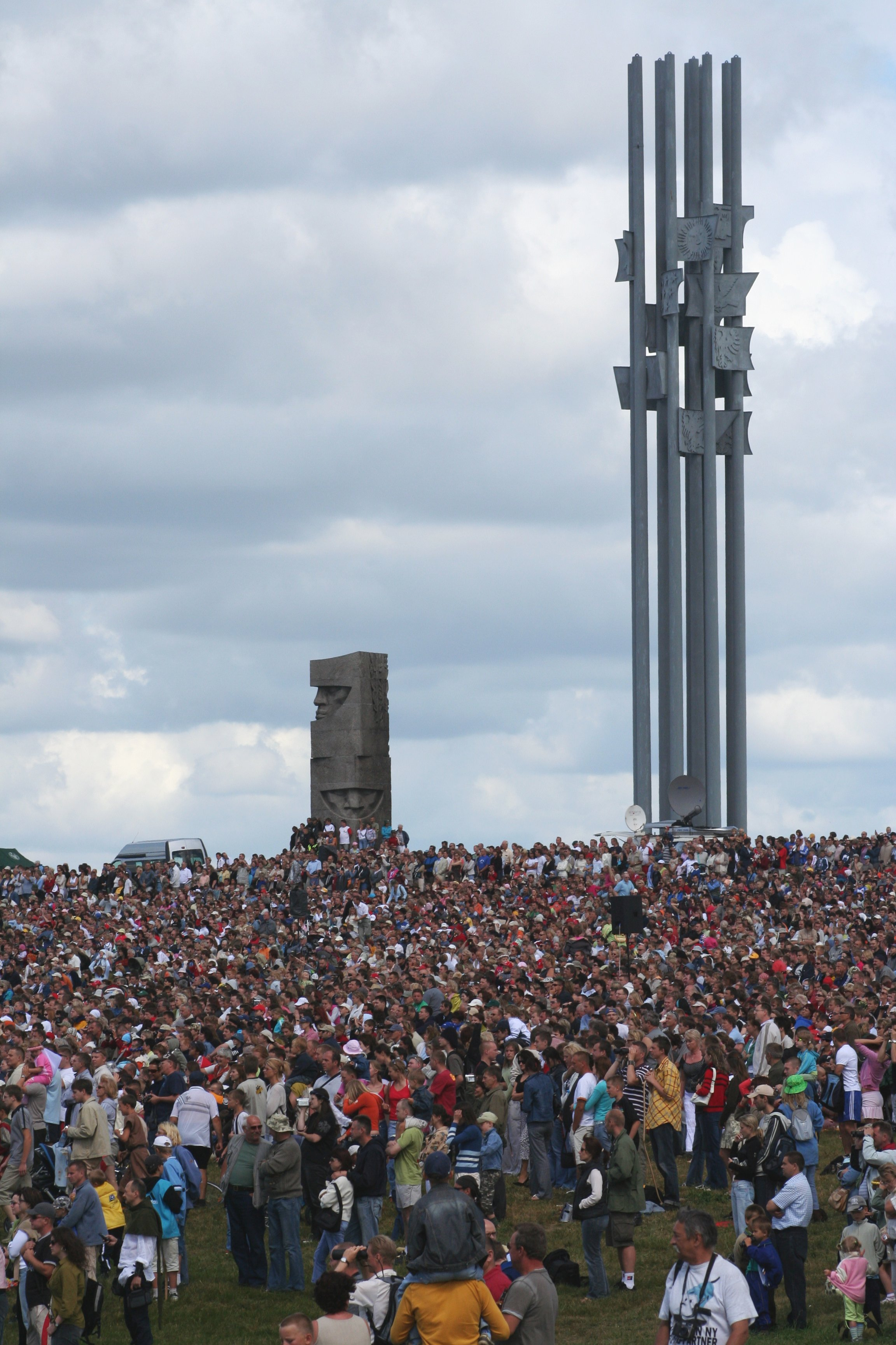 15.07.2006, inscenizacja bitwy pod Grunwaldem.